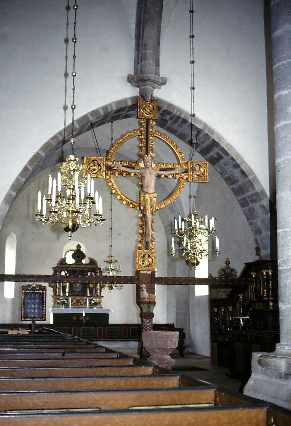 Stånga kyrka.Interiör med triumktucifixet.